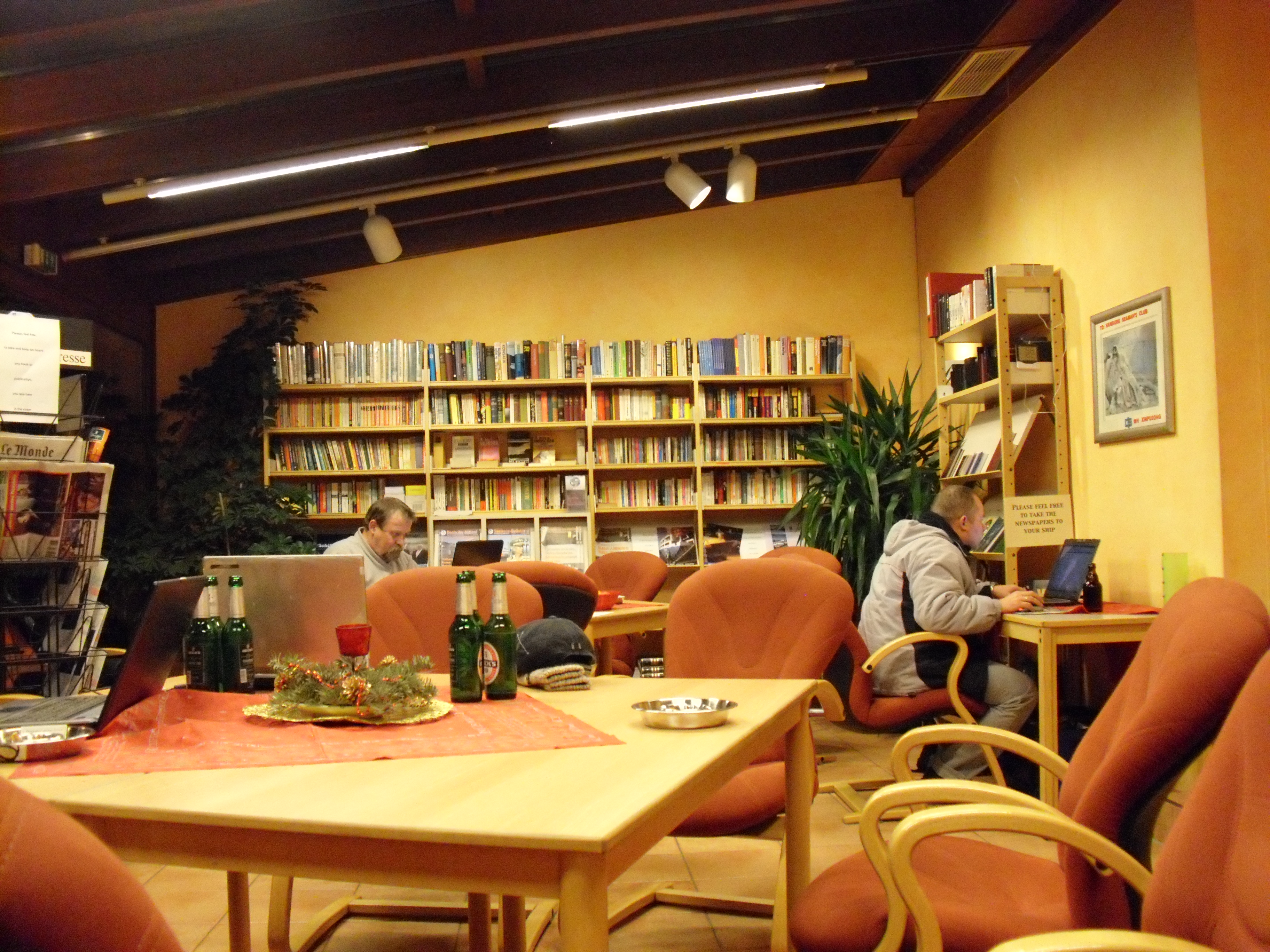 Der Seemannsclub Duckdalben im Hamburger Hafen wird von der Evangelisch-lutherischen Kirche betrieben.